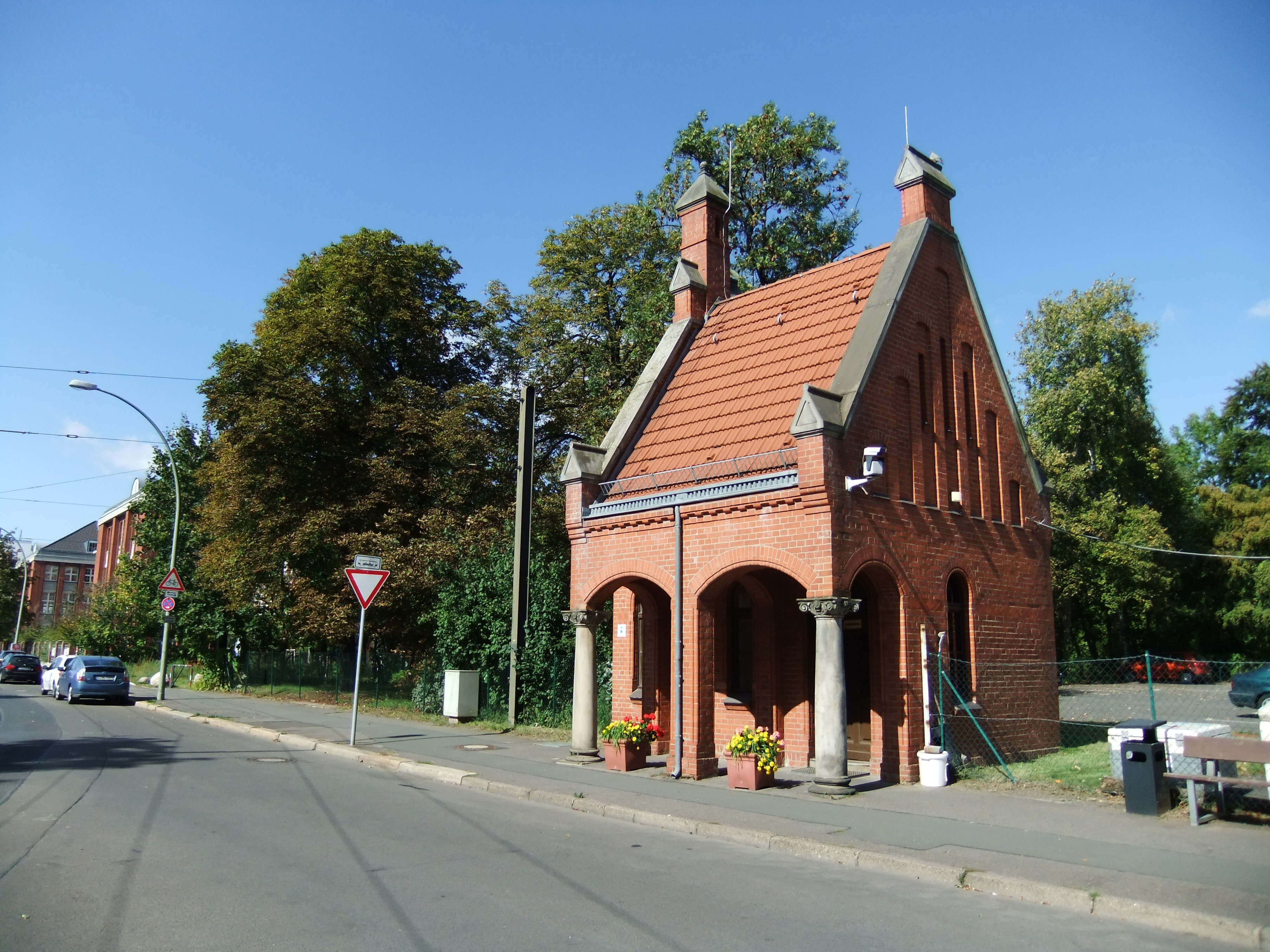 Denkmalliste Berlin OBJ-Dok-Nr.: 09040301 - Berlin Lichtenberg, Herzbergstraße 79 Haus 71 - Pförtnerhäuschen, ehem. Städtische Irrenanstalt Herzberge, 1889-1893 von Hermann Blankenstein (Denkmalbereiche, Gesamtanlagen)